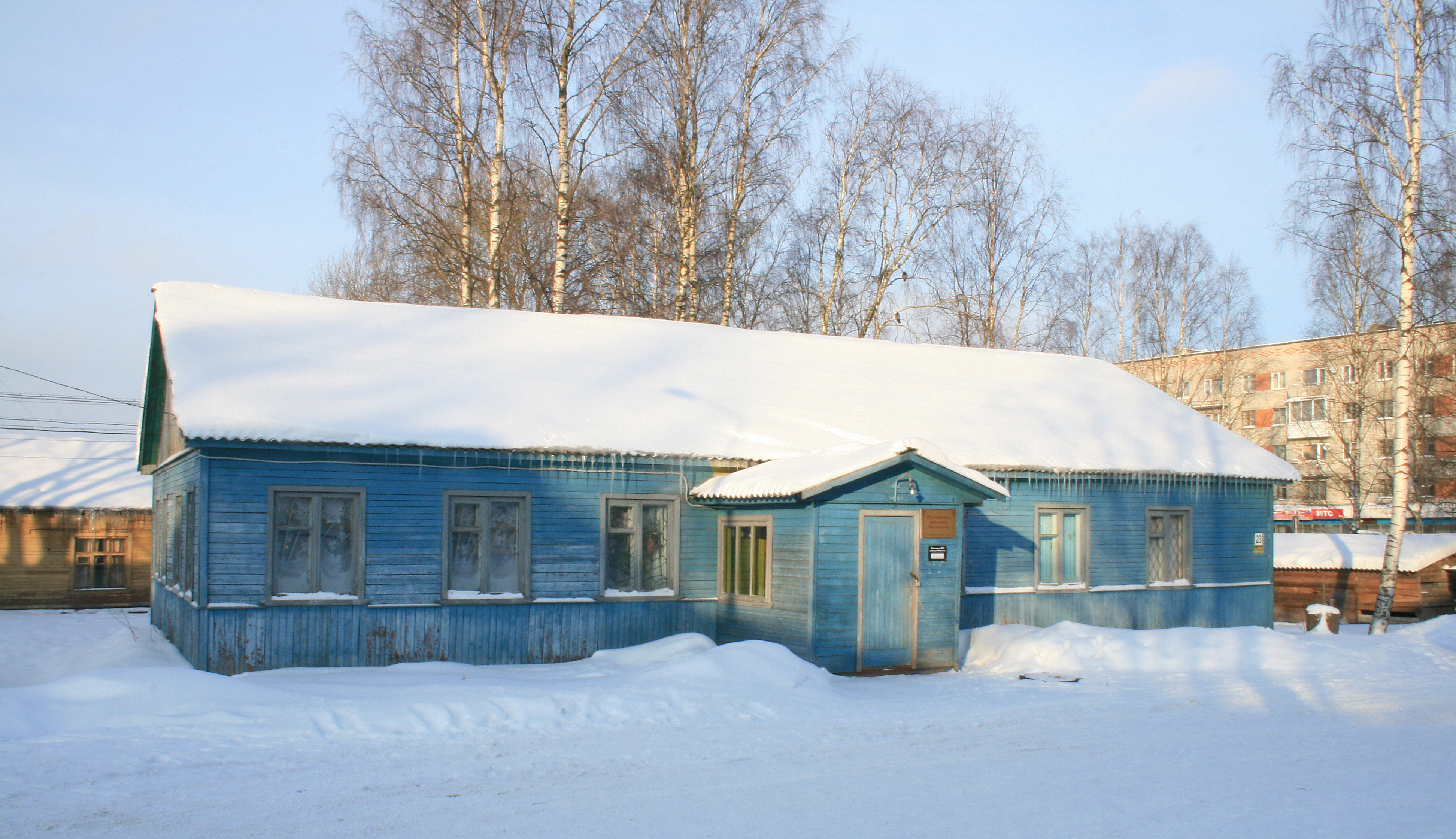 Пряжинская центральная районная библиотека. Республика Карелия, посёлок Пряжа, ул.Гагарина, д.23.